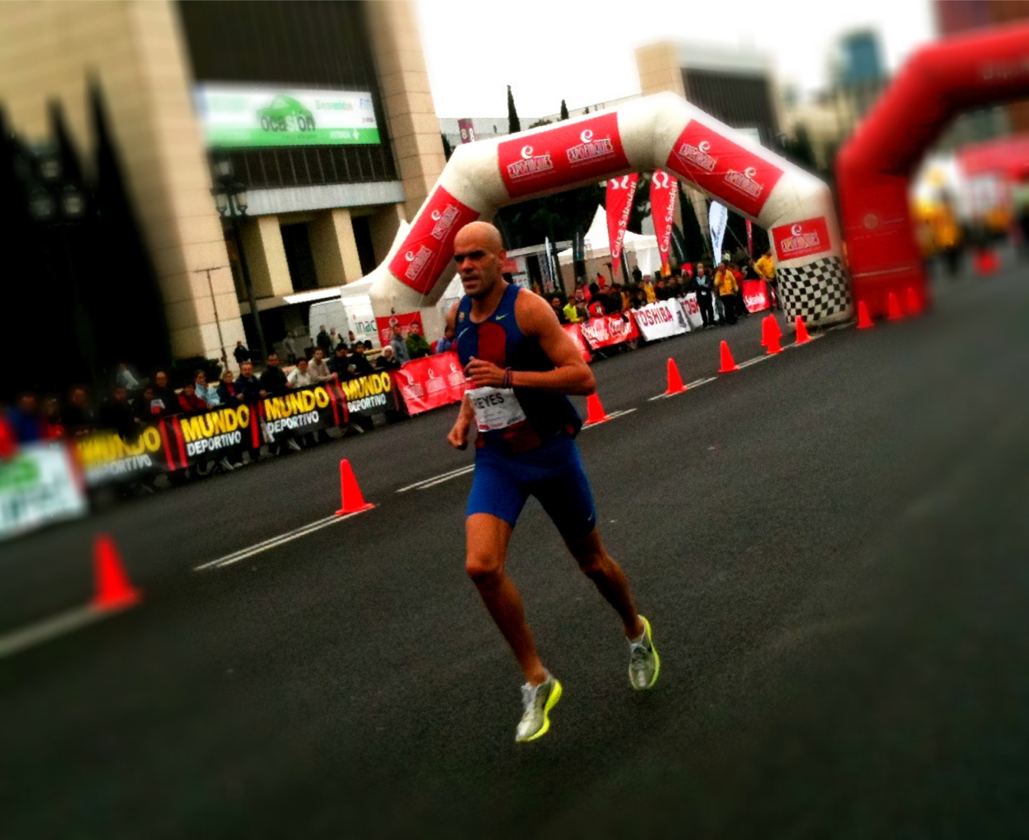 Reyes Estévez @ Jean Bouin